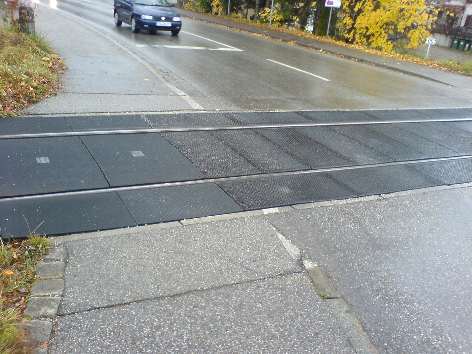 STRAIL® Bahnübergangsplatten aus Kunststoff an einem Bahnübergang in Lenggries.